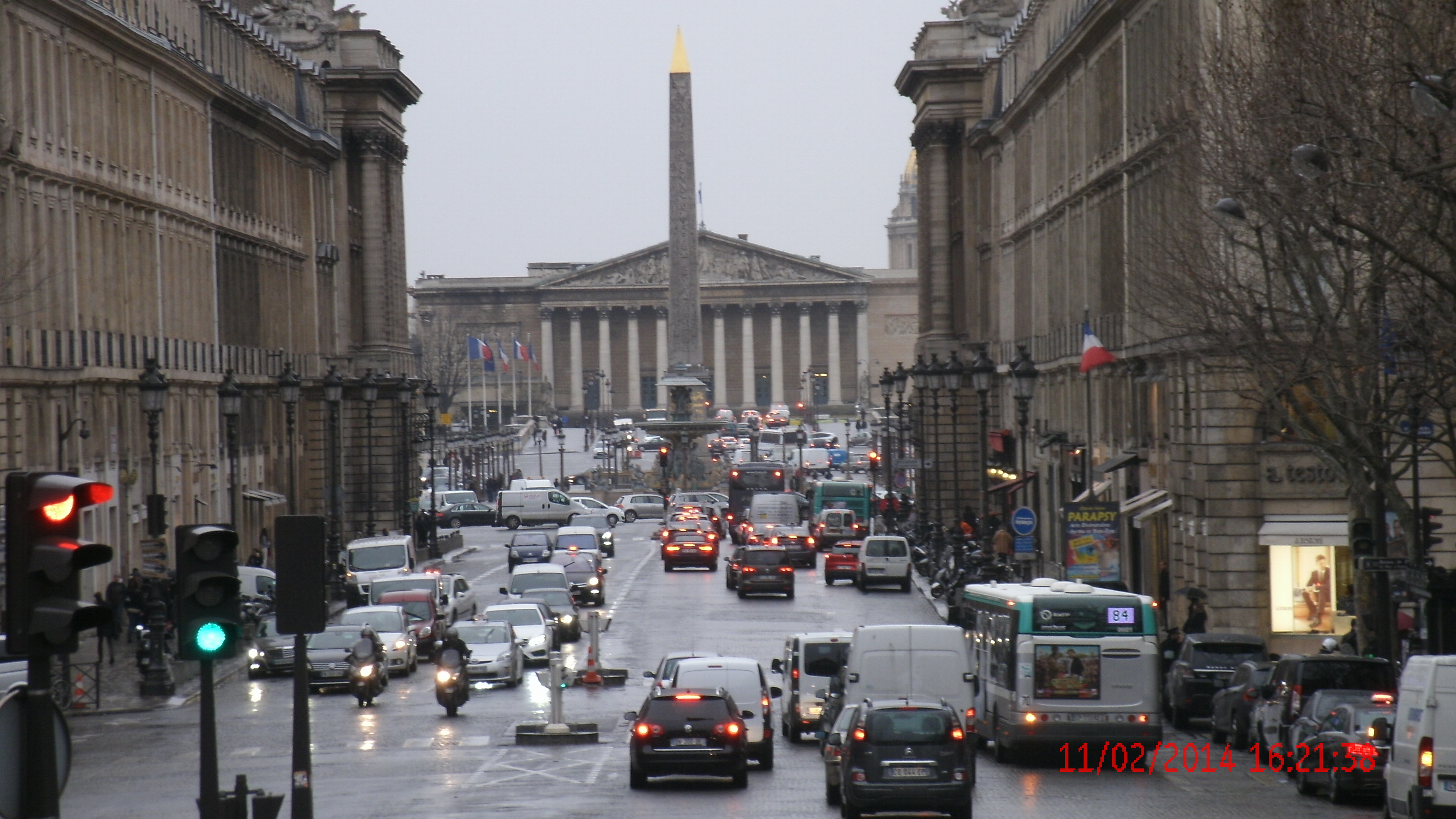 La rue Royale à Paris vue de l'église de la Madeleine